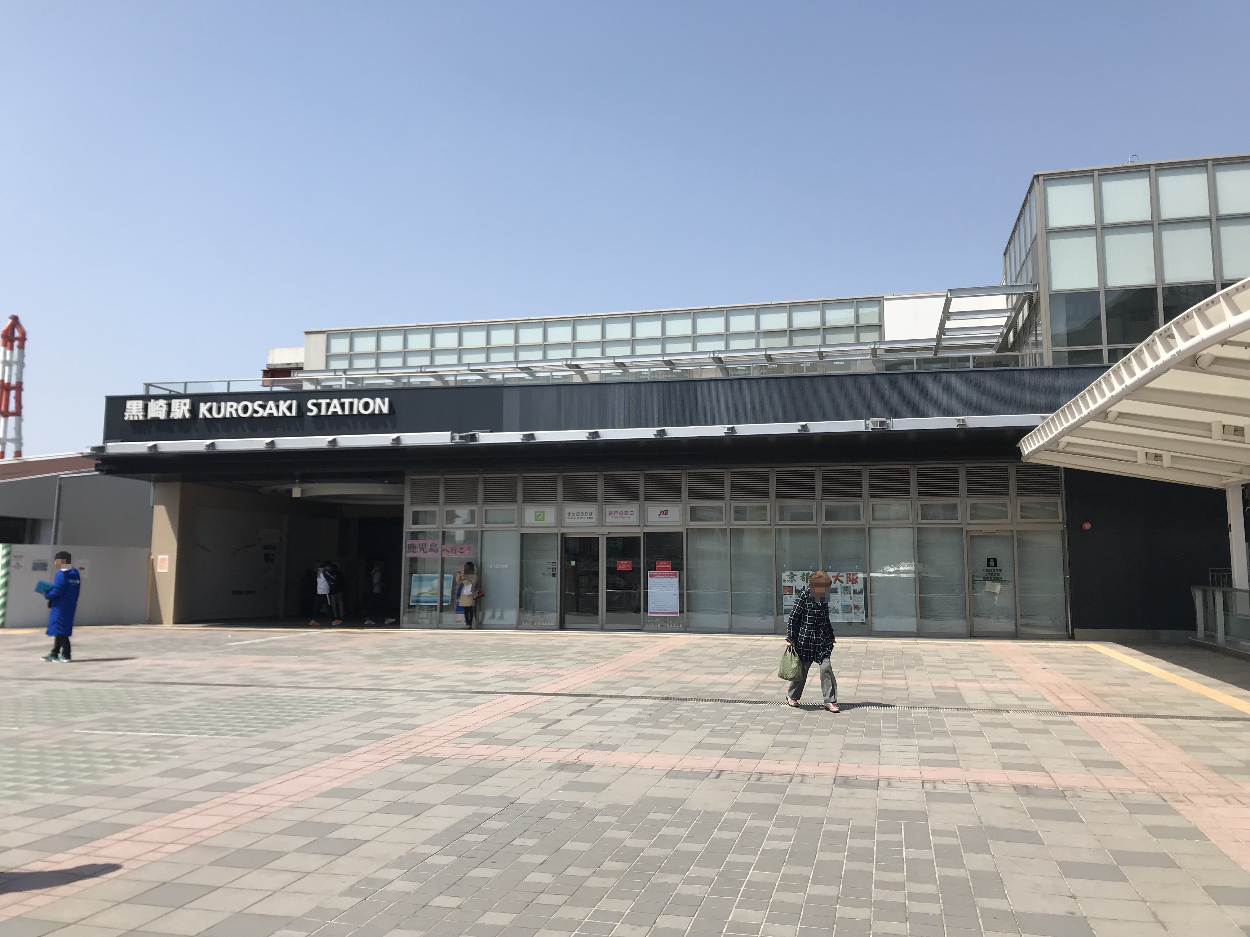 黒崎駅の駅舎